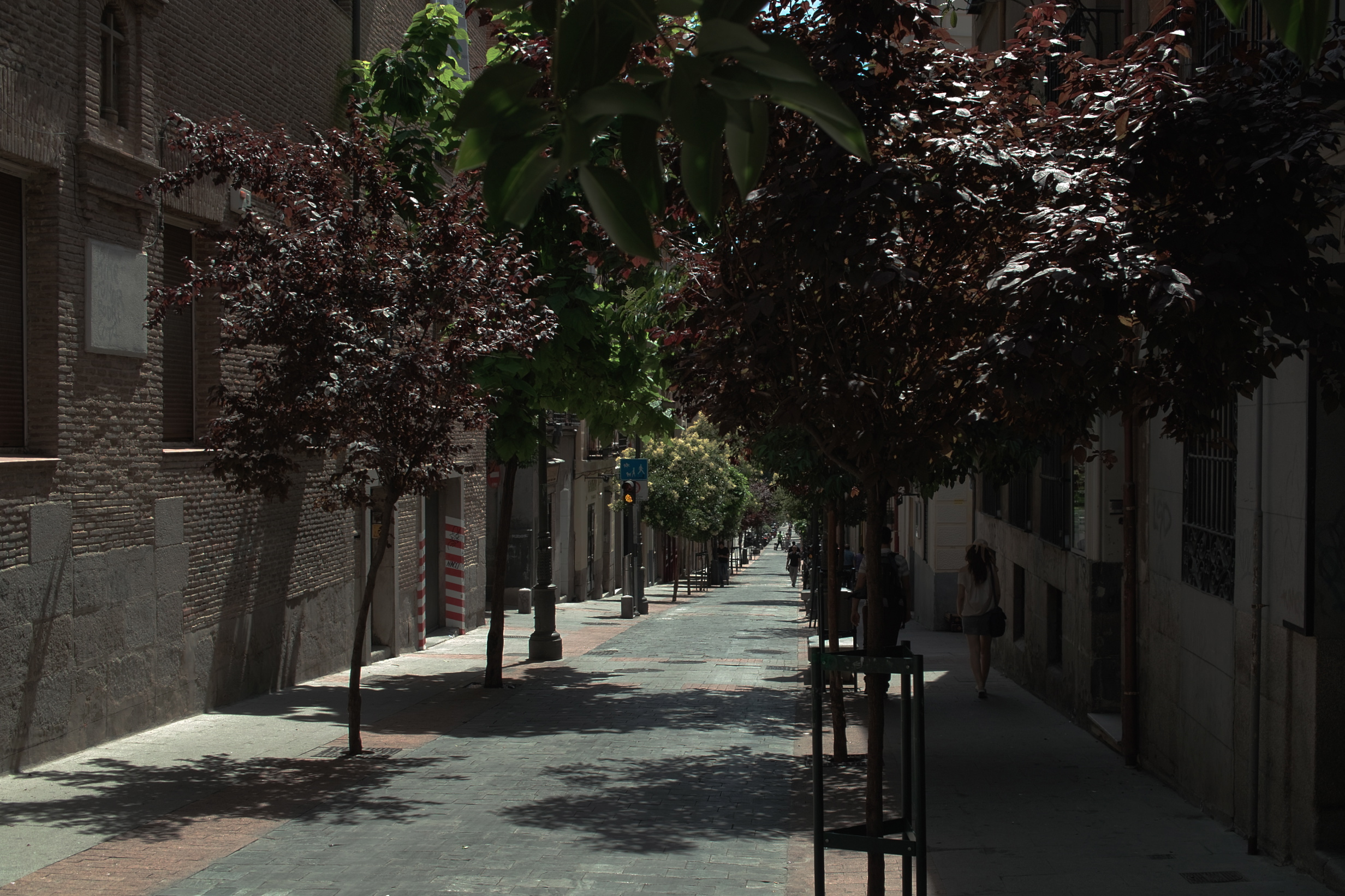 Calle de las Huertas (en torno al nº46), Madrid, España.